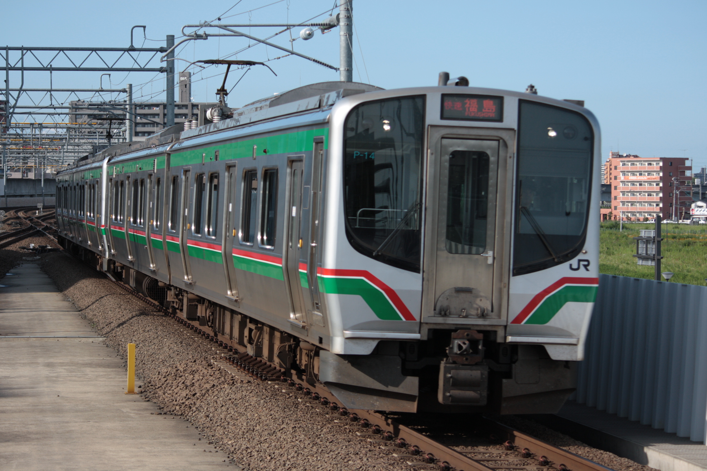 長町駅に進入するE721系0番台。